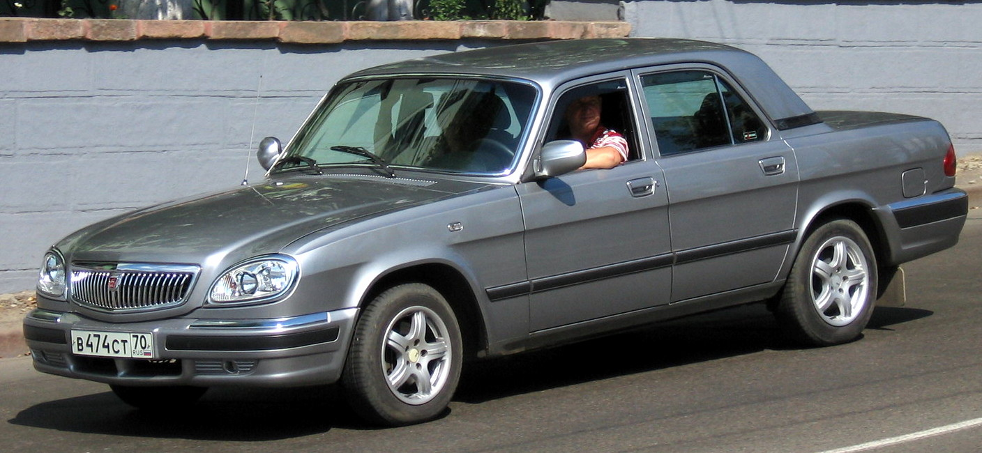 Photo taken in Tomsk, Tomsk Oblast, Russia